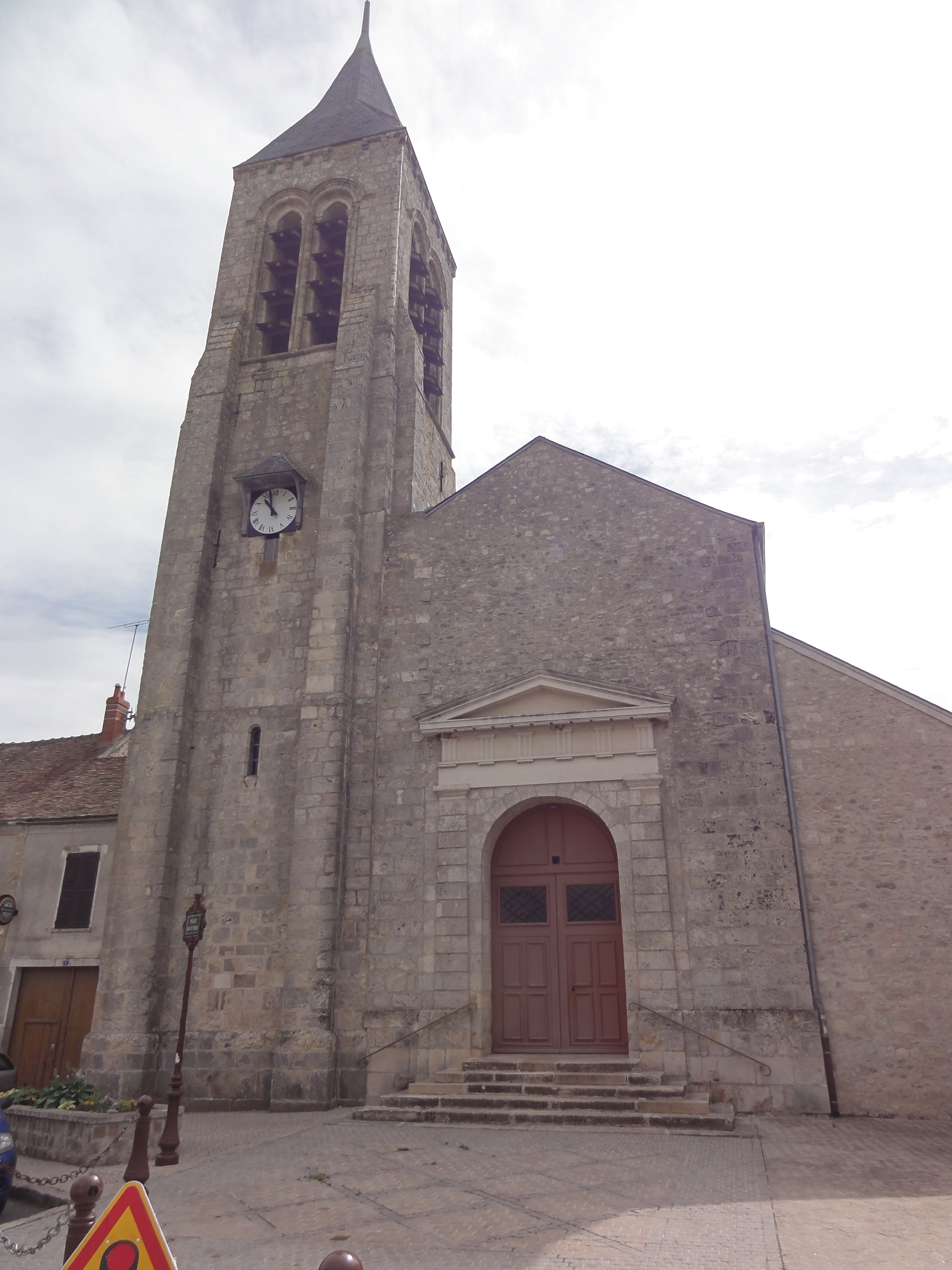 Méréville (Essonne) Église, façade